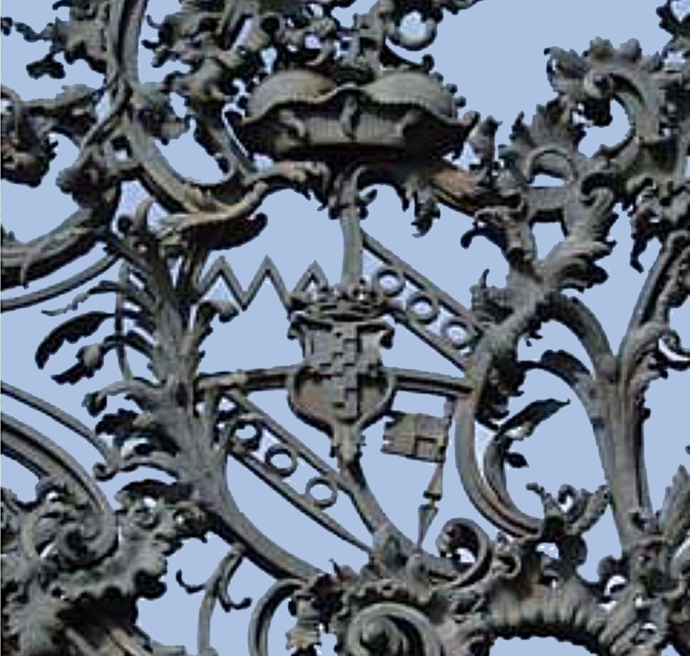 Wappen Anselm Franz von Ingelheim 1683-1749 Fürstbischof von Würzburg 1746-1749 im Torbogen der Residenz in Würzburg